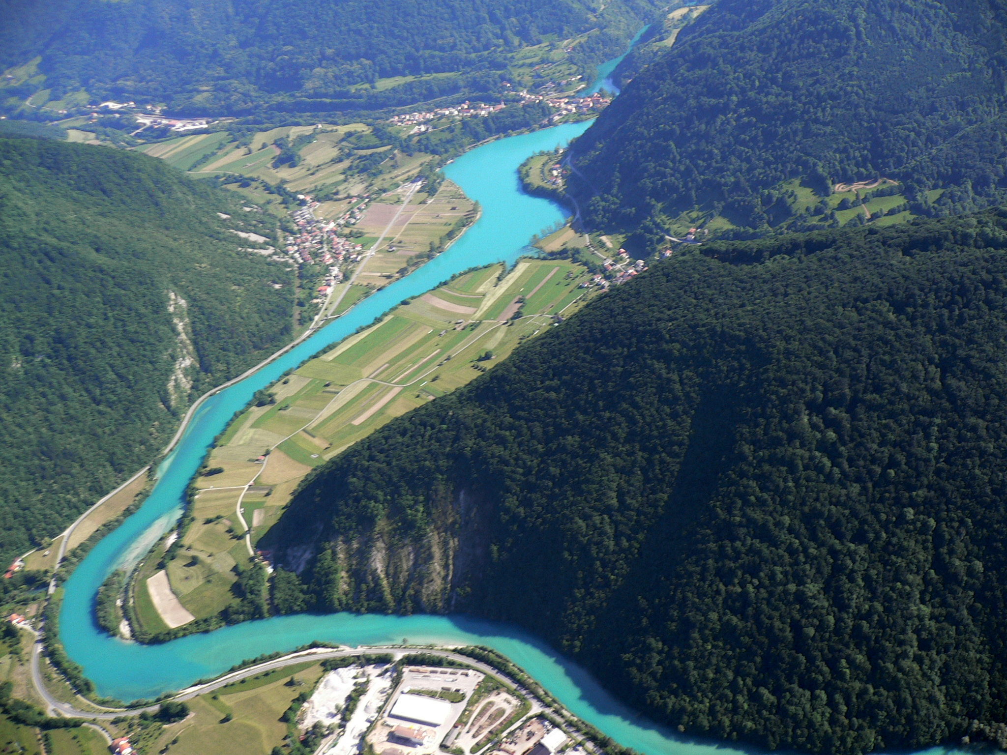 Vue aérienne de l'Isonzo